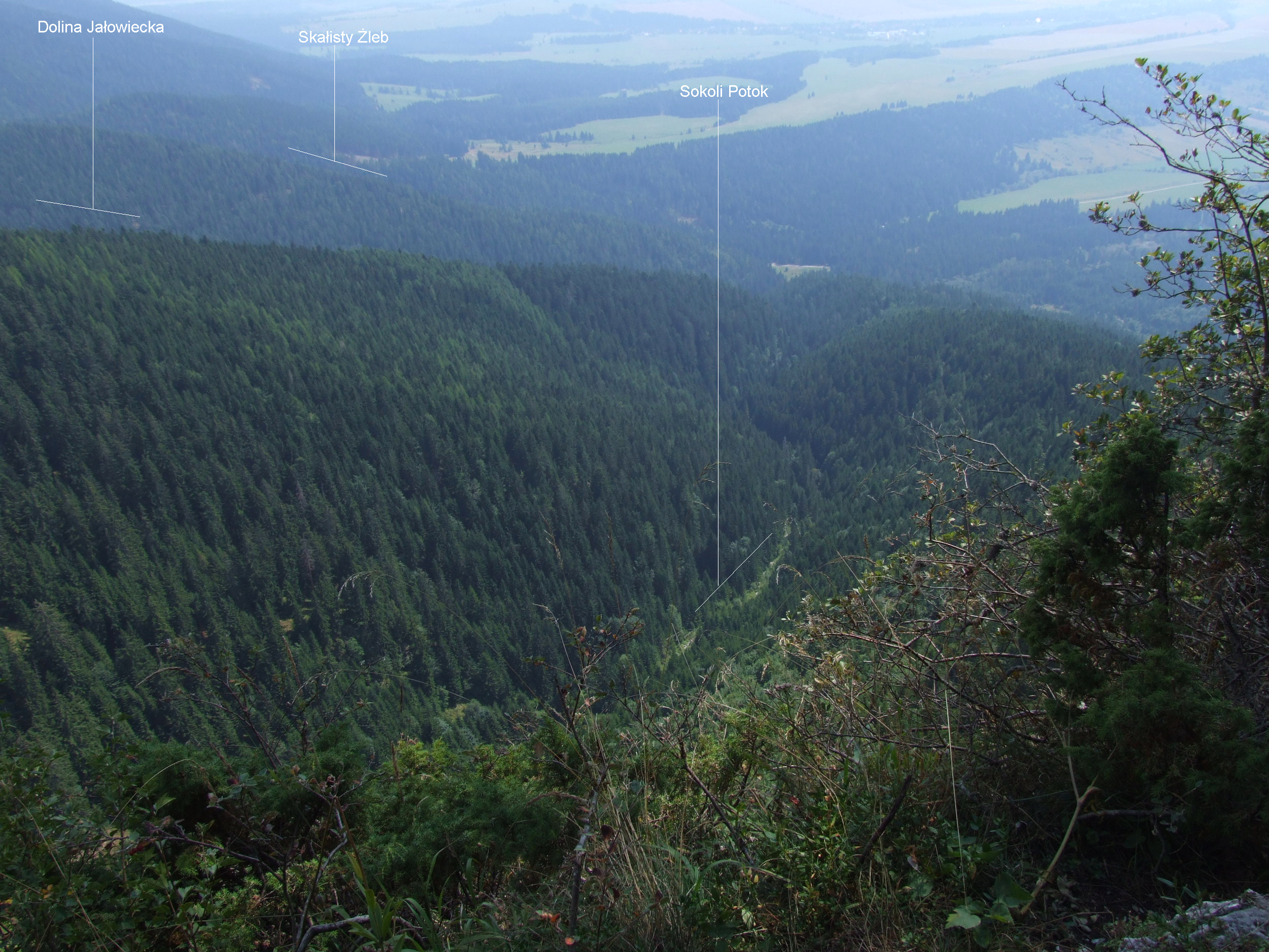 Widok na dolinę Sokolego Potoku z niebieskiego szlaku turystycznego